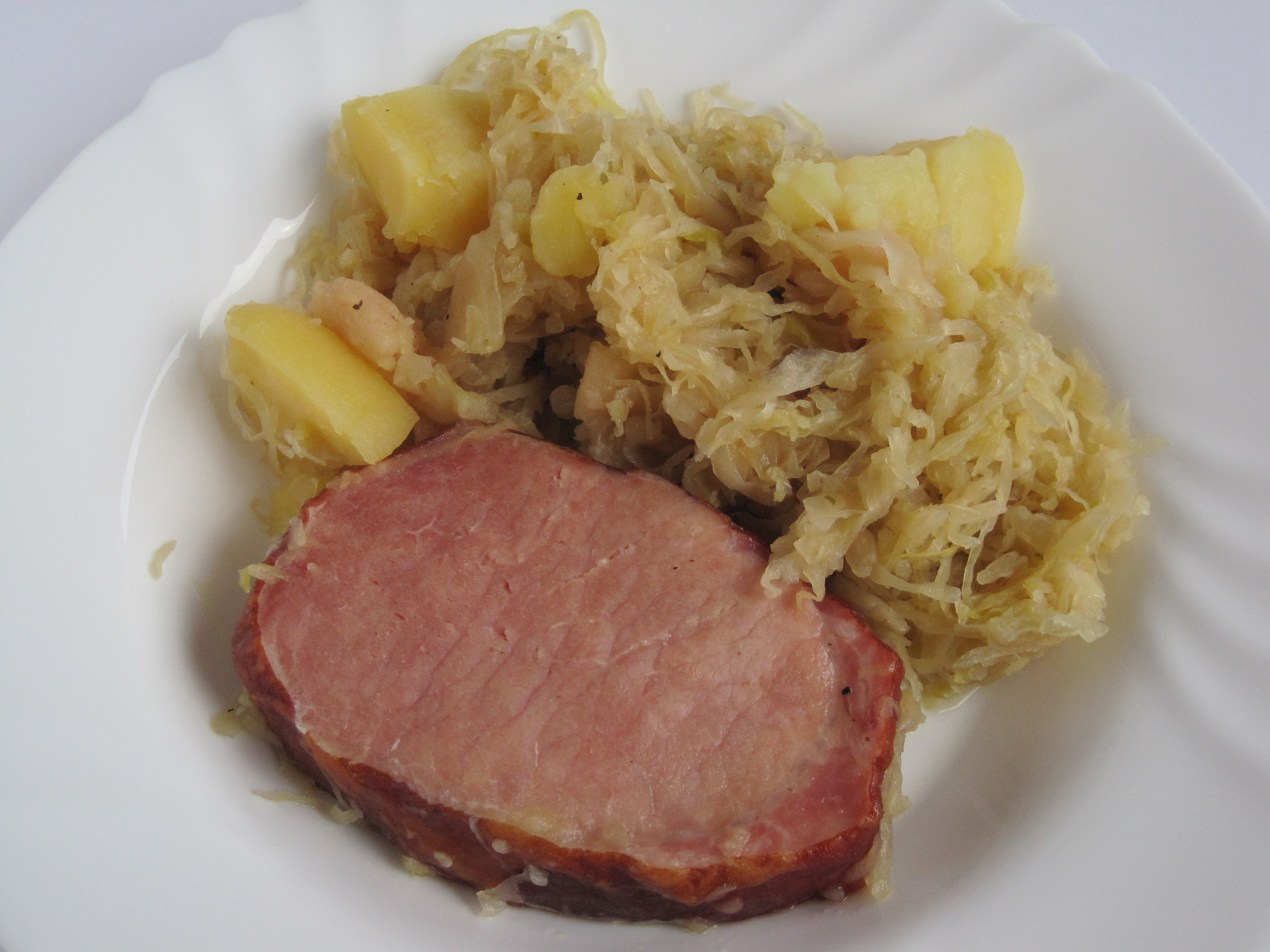 Sauerkraut mit Kartoffeln und Kasseler Rücken